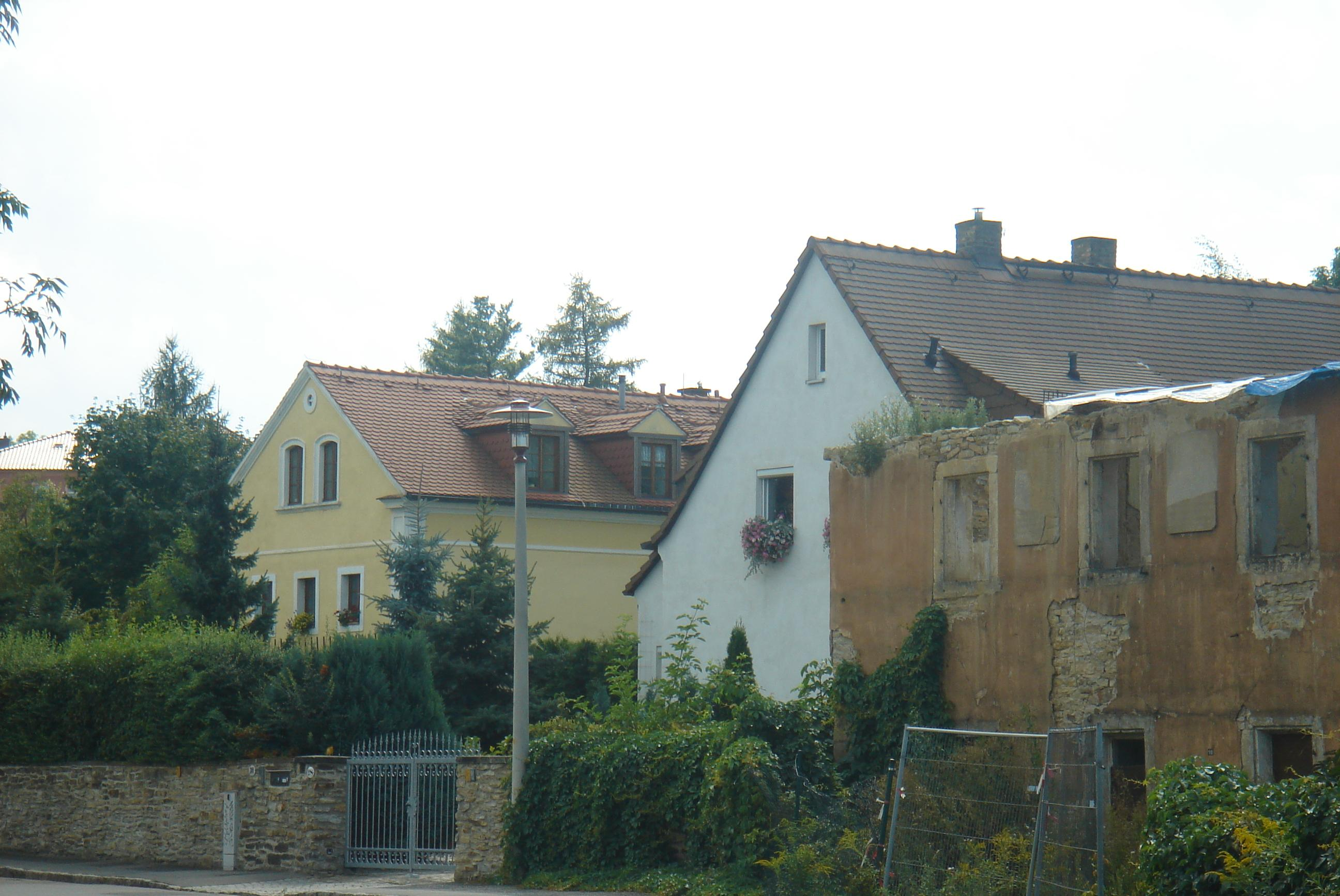 Dorfkern Cotta an der Hebbelstraße, rechts das Faustsche Weingut